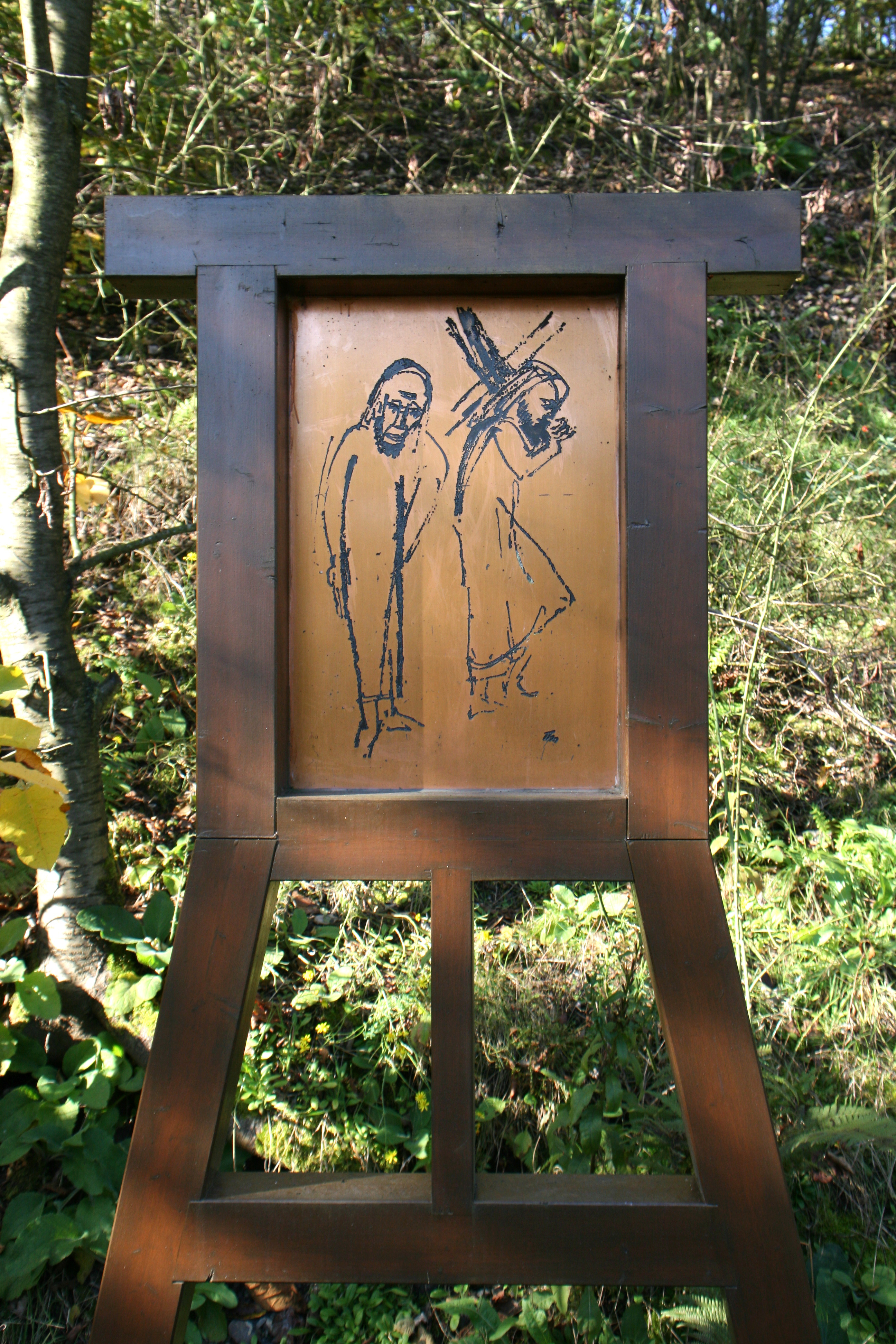 Kreuzweg, Station 5, auf Halde Haniel in Bottrop